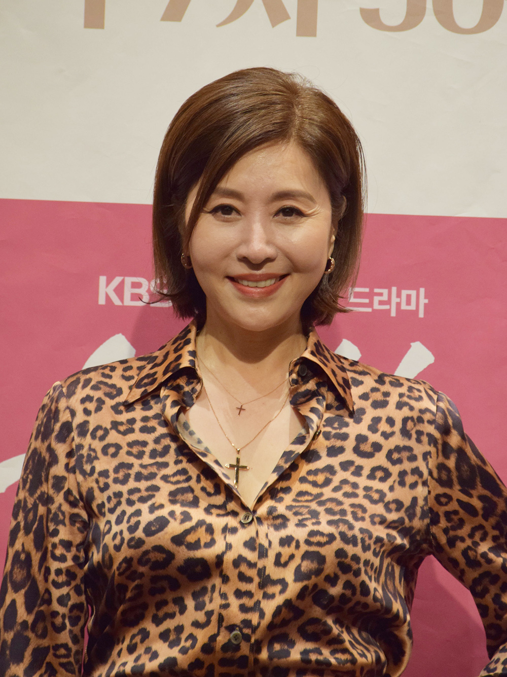 KBS 드라마 '우아한 모녀' 제작발표회 현장 (2019.10.31)